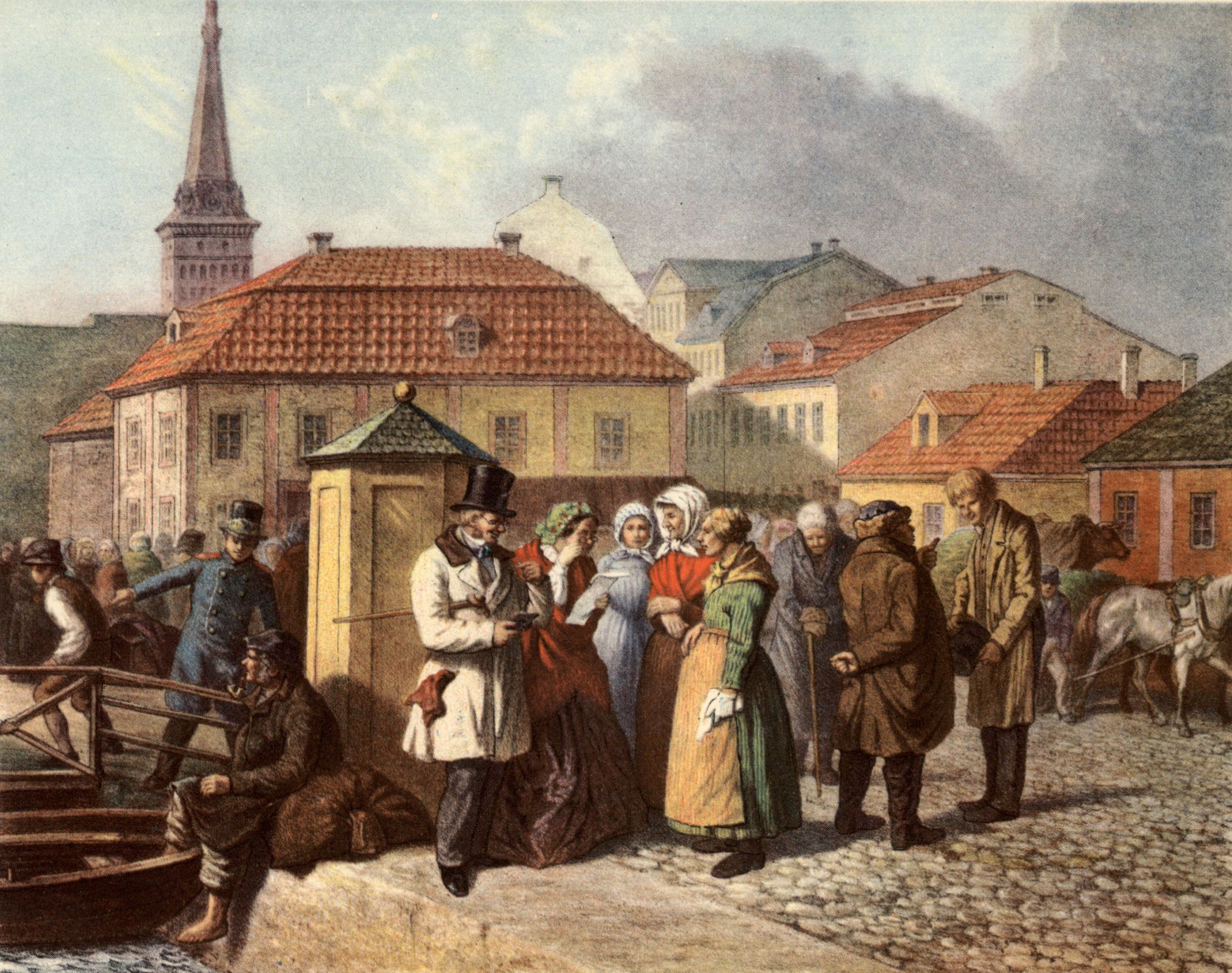 Folkmarknaden i Västerås hade årligen ägt rum en sensommarsöndag och torg och gator vimlade då av högtidsklädd landsbygdsungdom, som sökte plats som pigor och drängar och stadde sig hos husbönder och arbetsgivare, vilka också i stort antal mött upp. På 1860-talet upphävdes »folkmarknaden» officiellt — men ännu 1871 hölls den »enligt gammal vana», om ock dess ursprungliga uppgift gått förlorad.